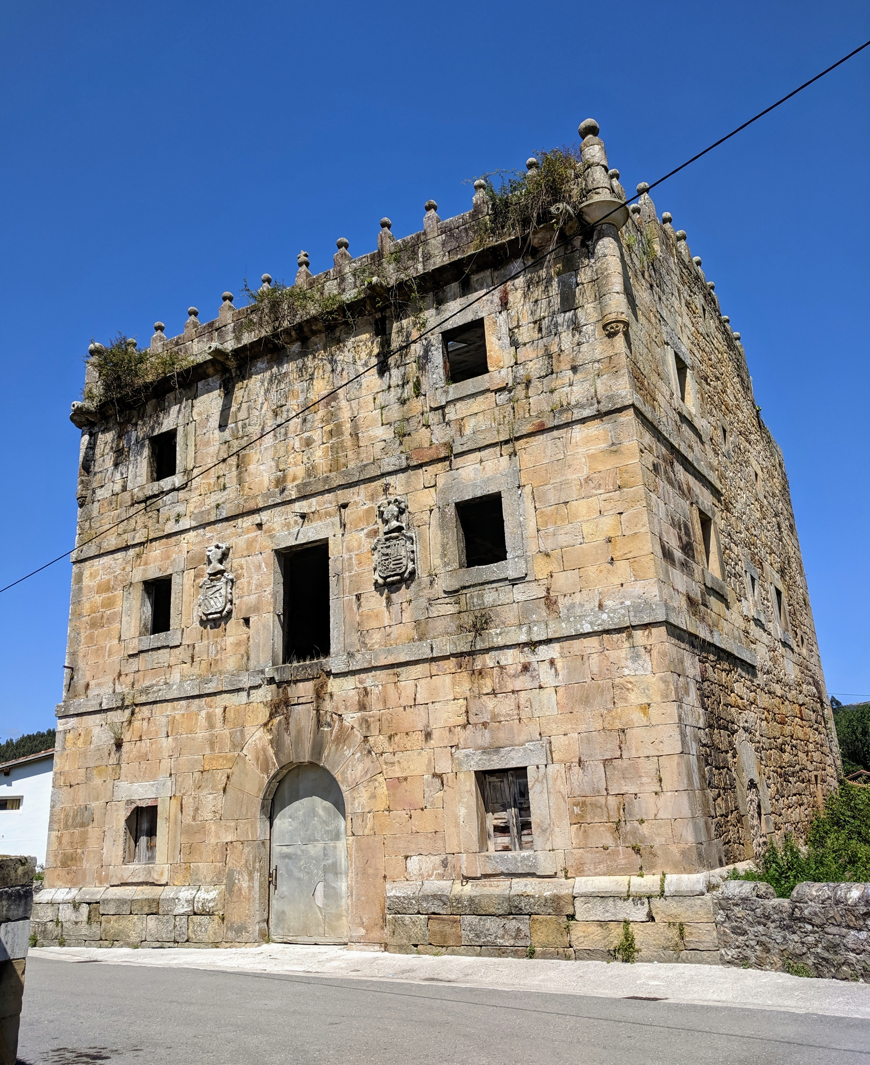 Casa-torre de Hoyos, en Villanueva de la Peña (Mazcuerras, Cantabria).